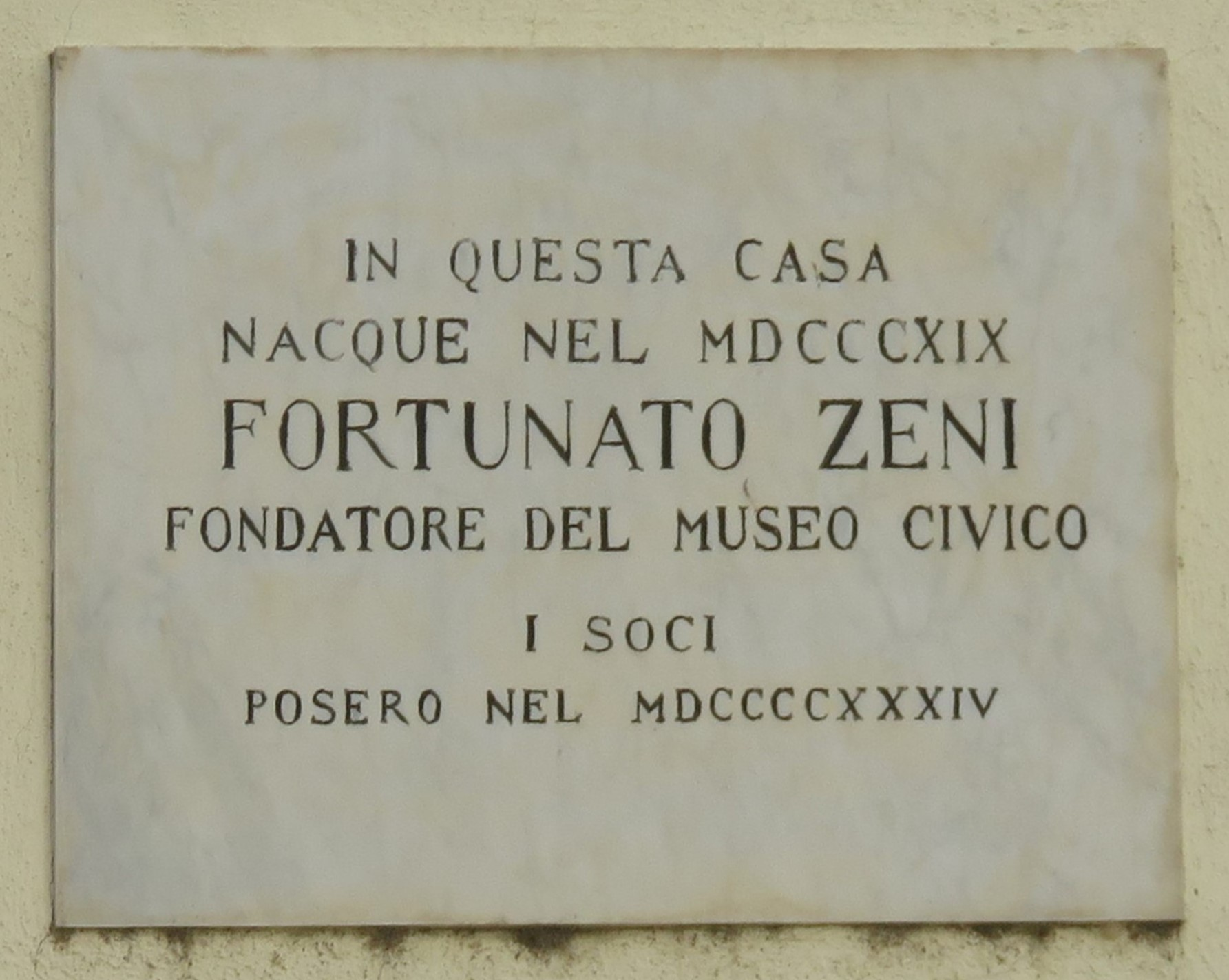 Borgo San Tommaso, oggi Borgo Santa Maria, a Rovereto. Casa natale di Fortunato Zeni - Epigrafe sulla casa.